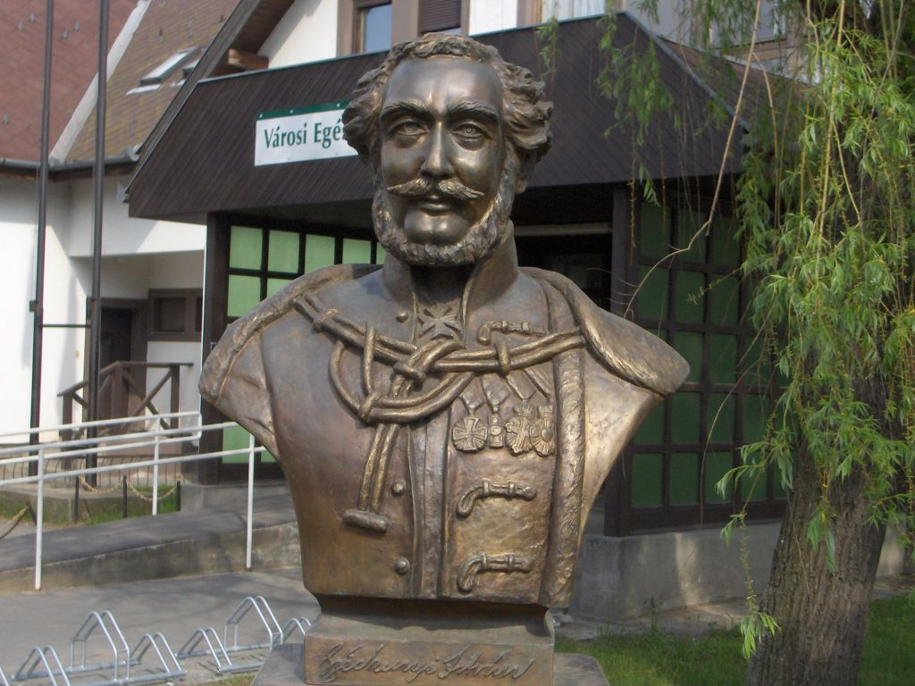 Gyál, Széchenyi szobor (bronz). A szobrot Barth Károly szobrászművész ajándékozta a városnak 2005-ben. Háttérben az Egészségügyi Központ. Gyál, József Attila - Kőrösi út sarok. (c) Szauter Lajos Szabadon felhasználható felvétel a forrás (Wikipédia) és a képet készítő megjelölésével.